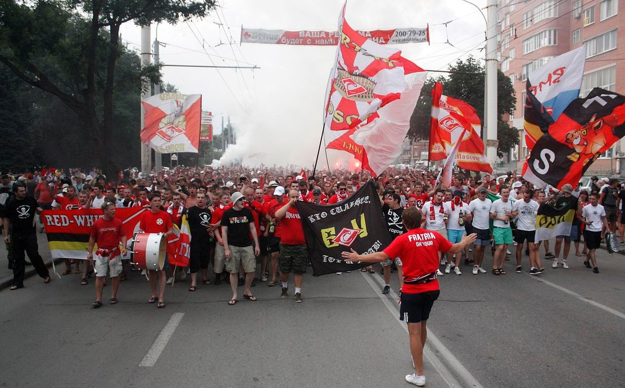 Проход нескольких тысяч фанатов "Спартака" в Ростове-на-Дону. 2010 год